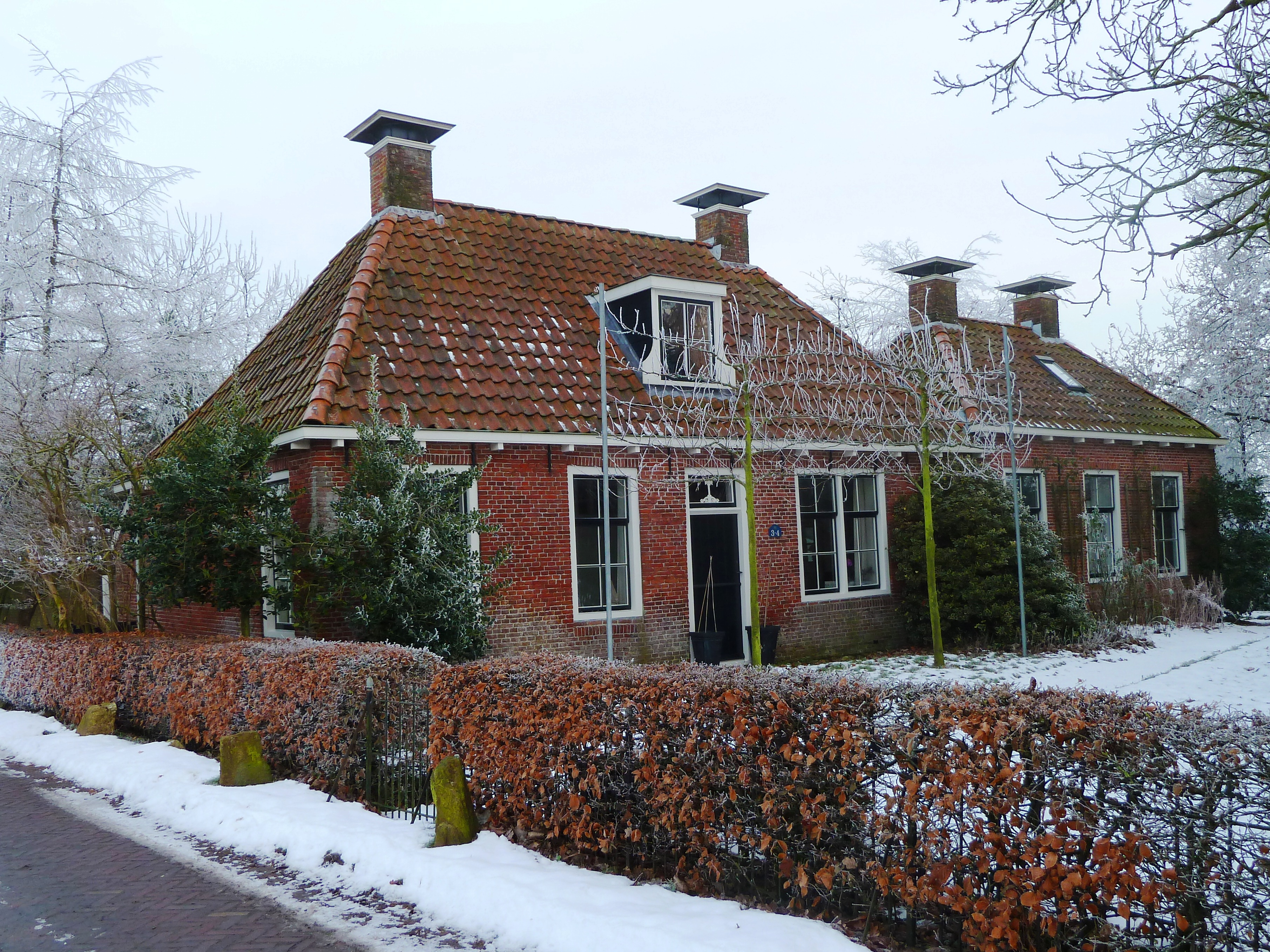 Voormalige school en bovenmeesterwoning van Augsbuurt.